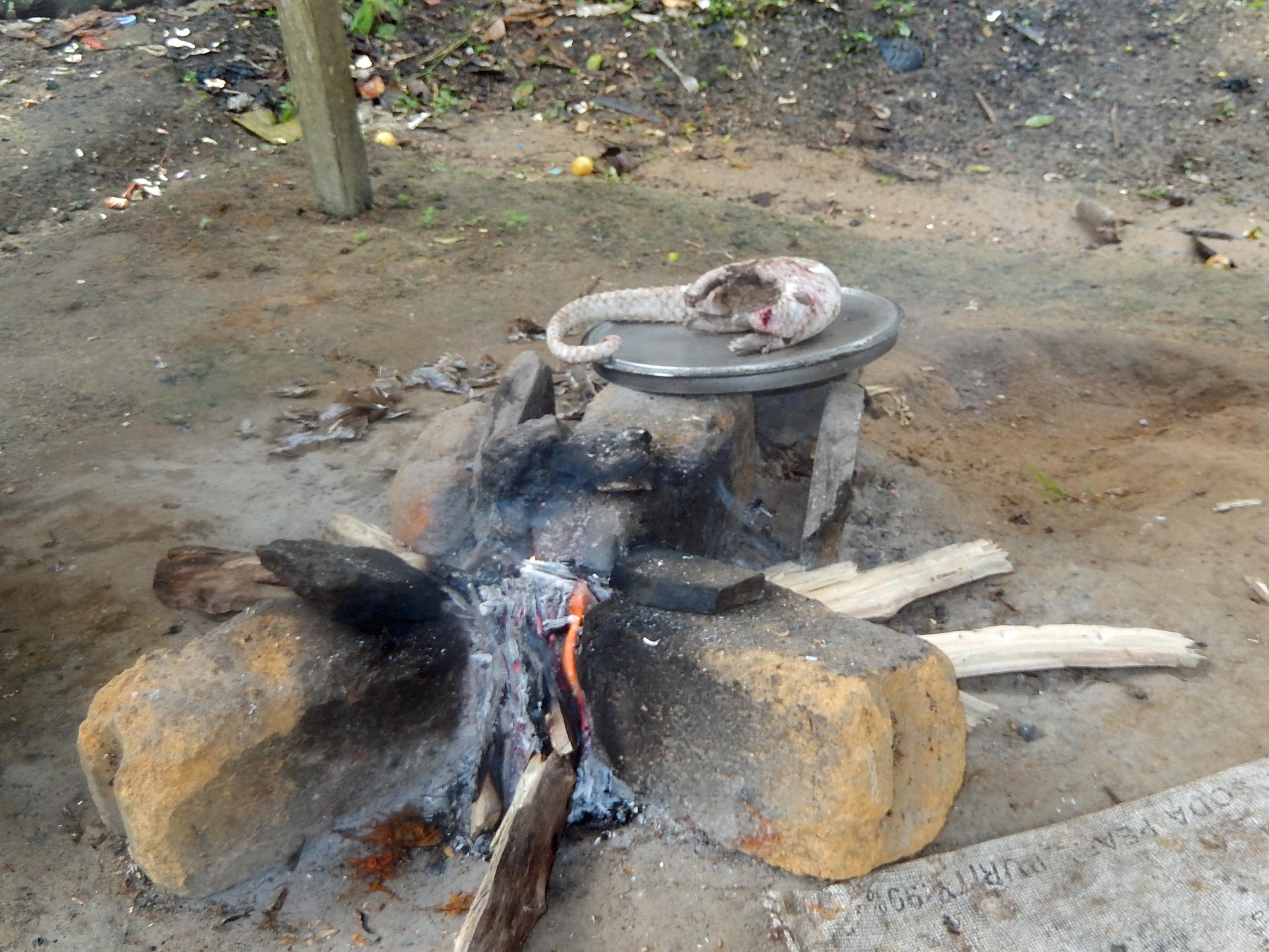 Préparation et cuisson du pangolin au Cameroun (Ngog-Mapubi, région du Centre)